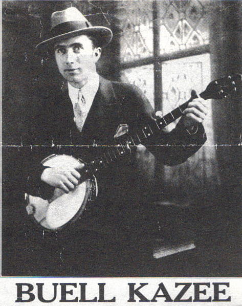 Folk- und Hillbilly-Musiker Buell Kazee